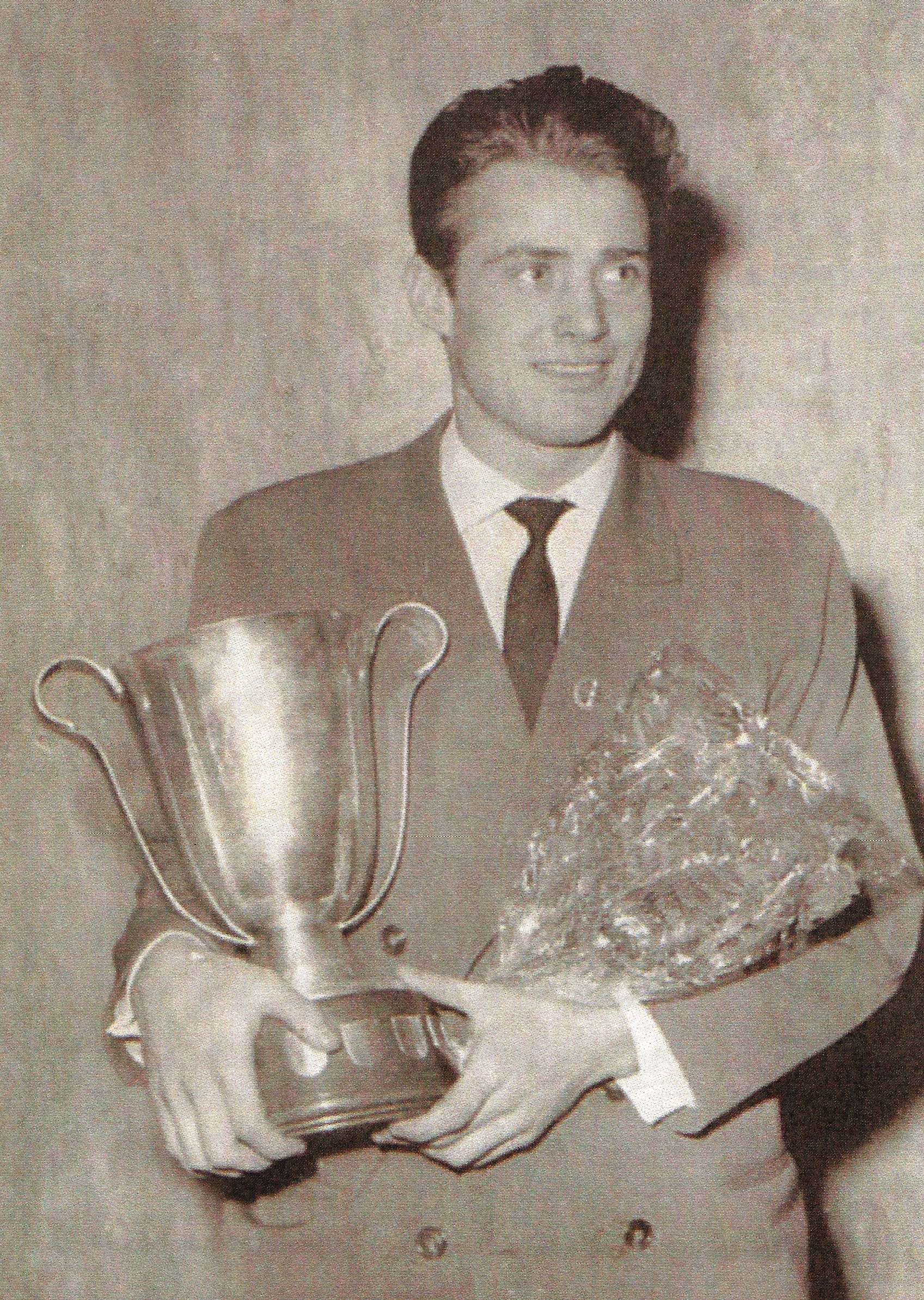 Cupa Campionilor Mondiali in 1961